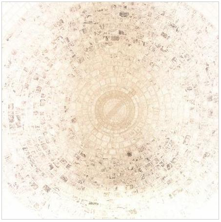 Portada de cd